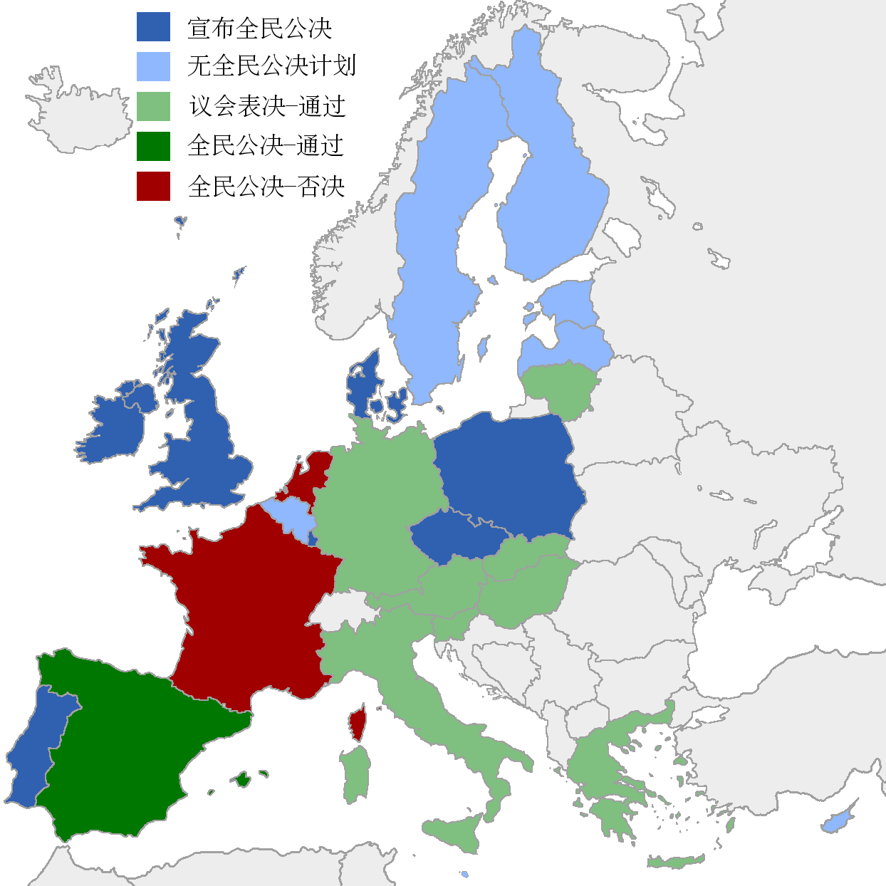 欧盟宪法批准地图。